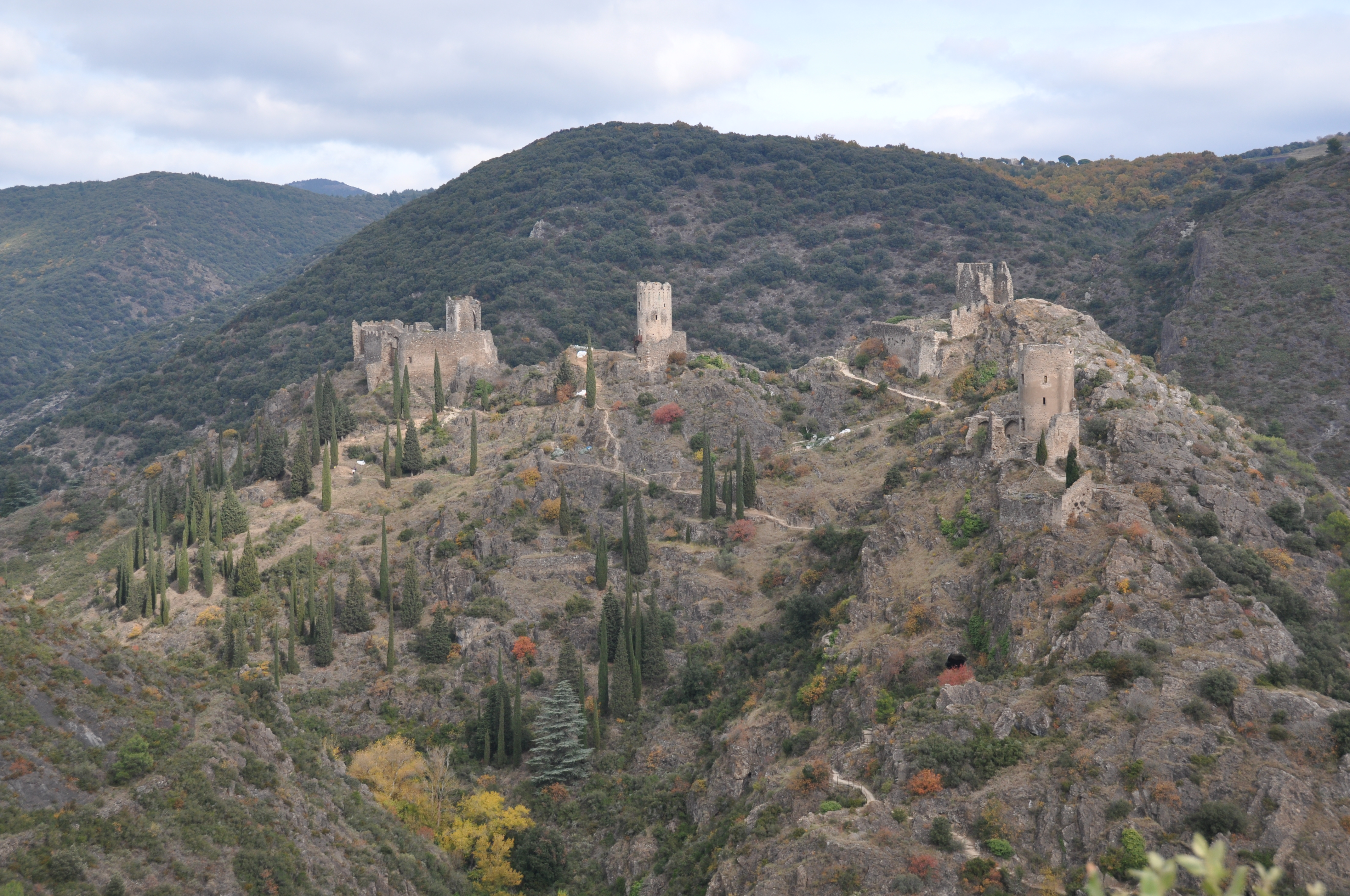 Lastours (Aude, France) - Les quatre châteaux vus du belvédère.